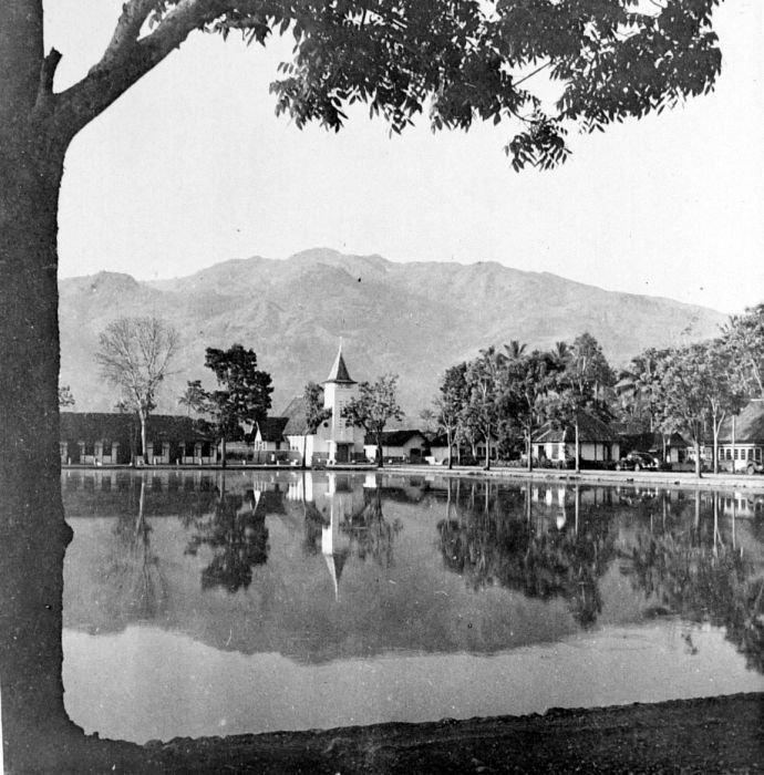 Repronegatief. Vijver in het centrum van Makale, Celebes